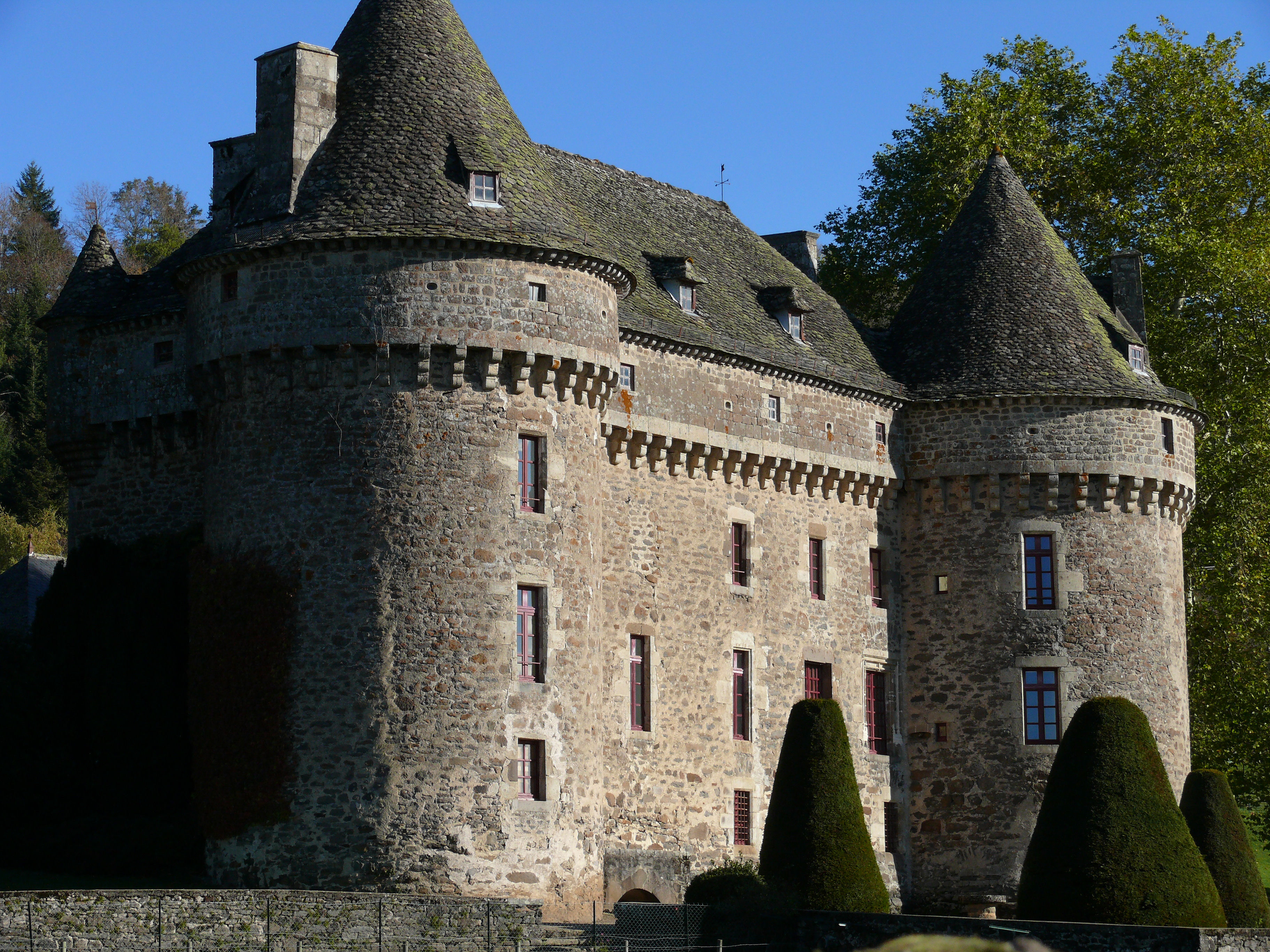 Château d'Auzers